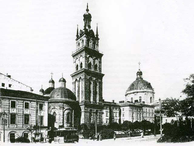 Успенська (Волоська) церква та вежа Корнякта. Фото к. ХІХ - п. ХХ ст.